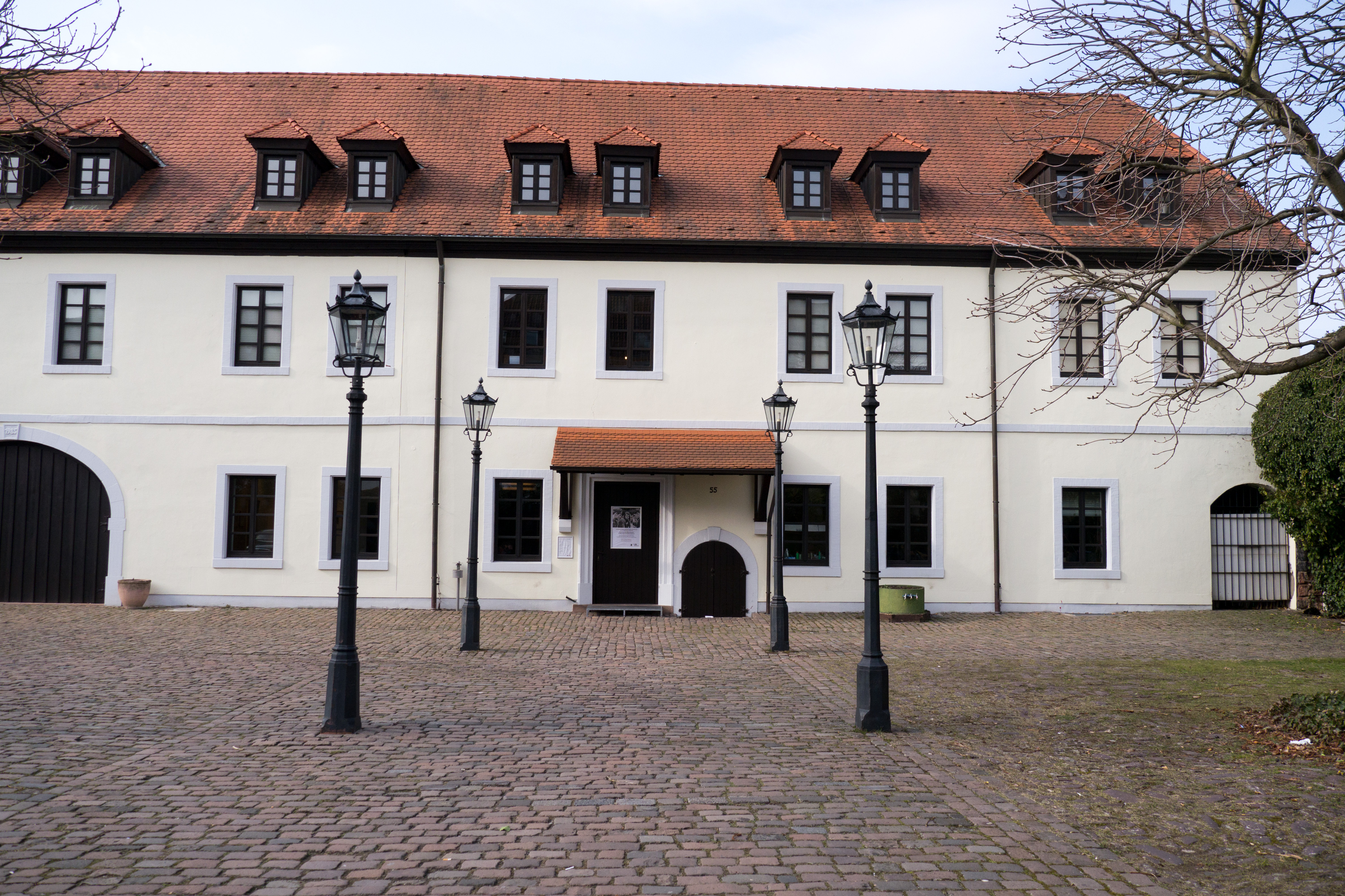 Außenansicht des Wadgasserhof in Kaiserslautern